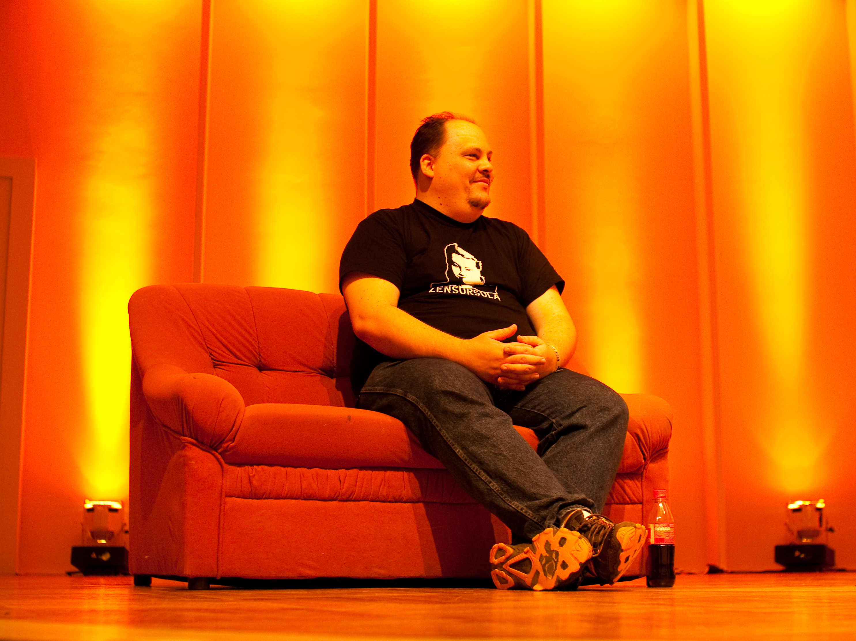 Rotes Sofa und Felix von Leitner („Fefe“) auf dem Podium während des Chaos Communication Congresses 2009.